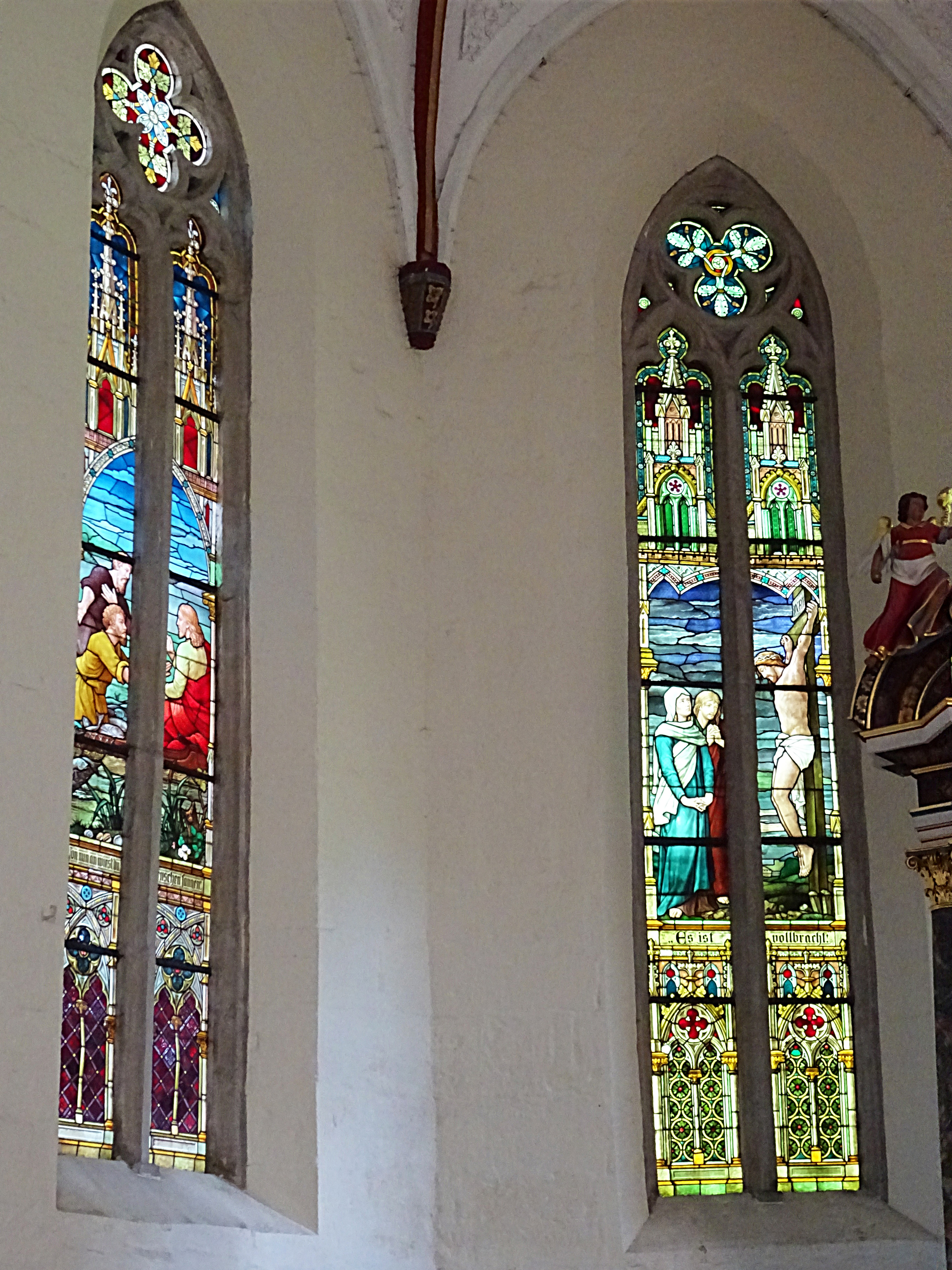 linke Chorfenster aus den Berliner Glasmalerwerkstätten in St. Petri (Mühlhausen, Thüringen)